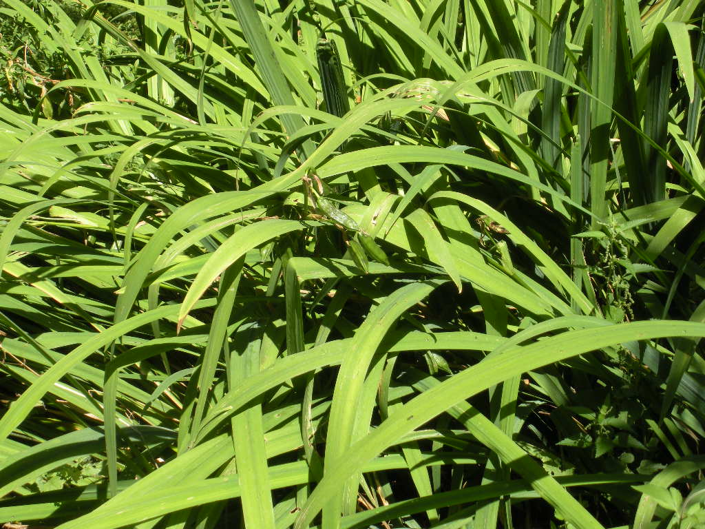 Giaggiolo acquatico Foto personale